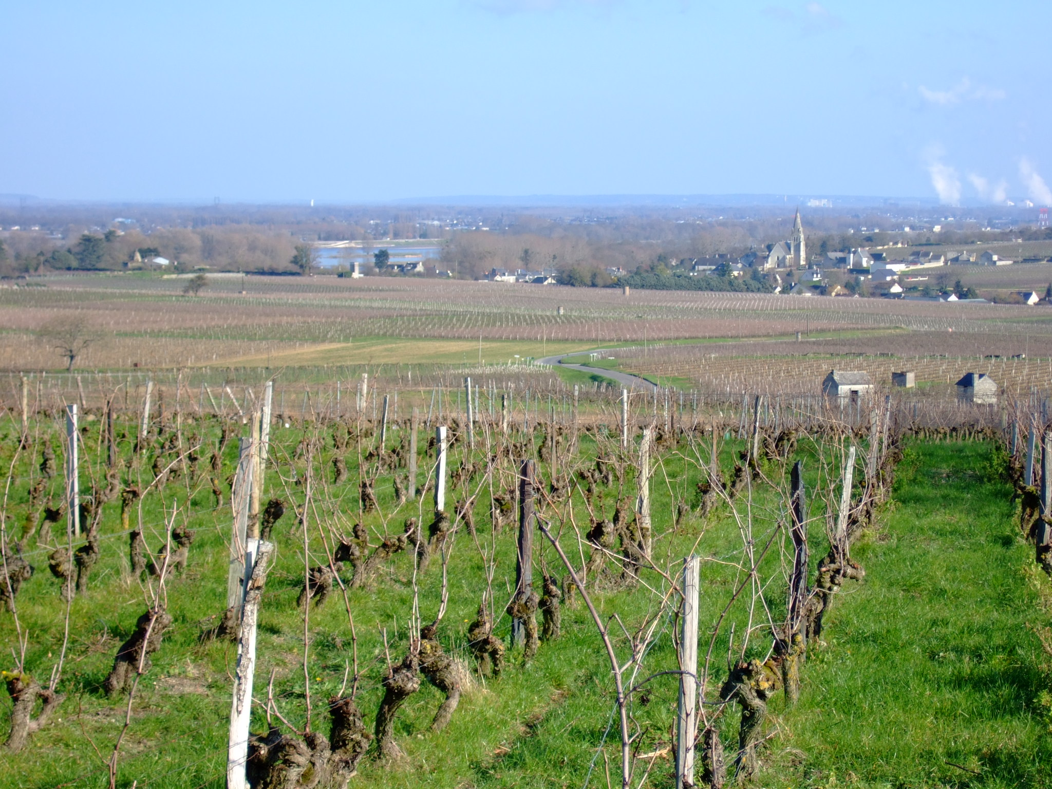 Les vignobles à Souzay-Champigny